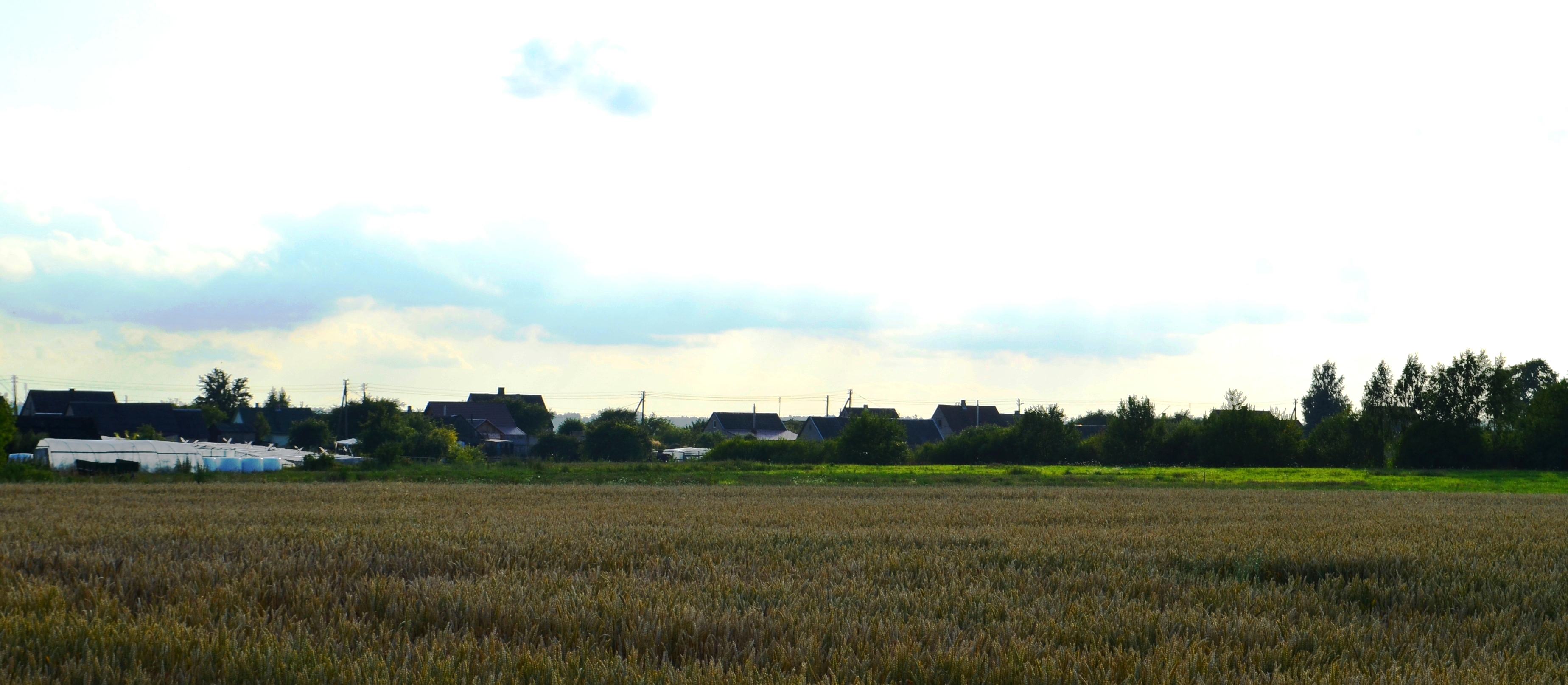 Valučiai, Kėdainių r.